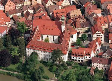 Luftbild Johann-Baptist-Hirscherhaus, Priesterseminar Rottenburg